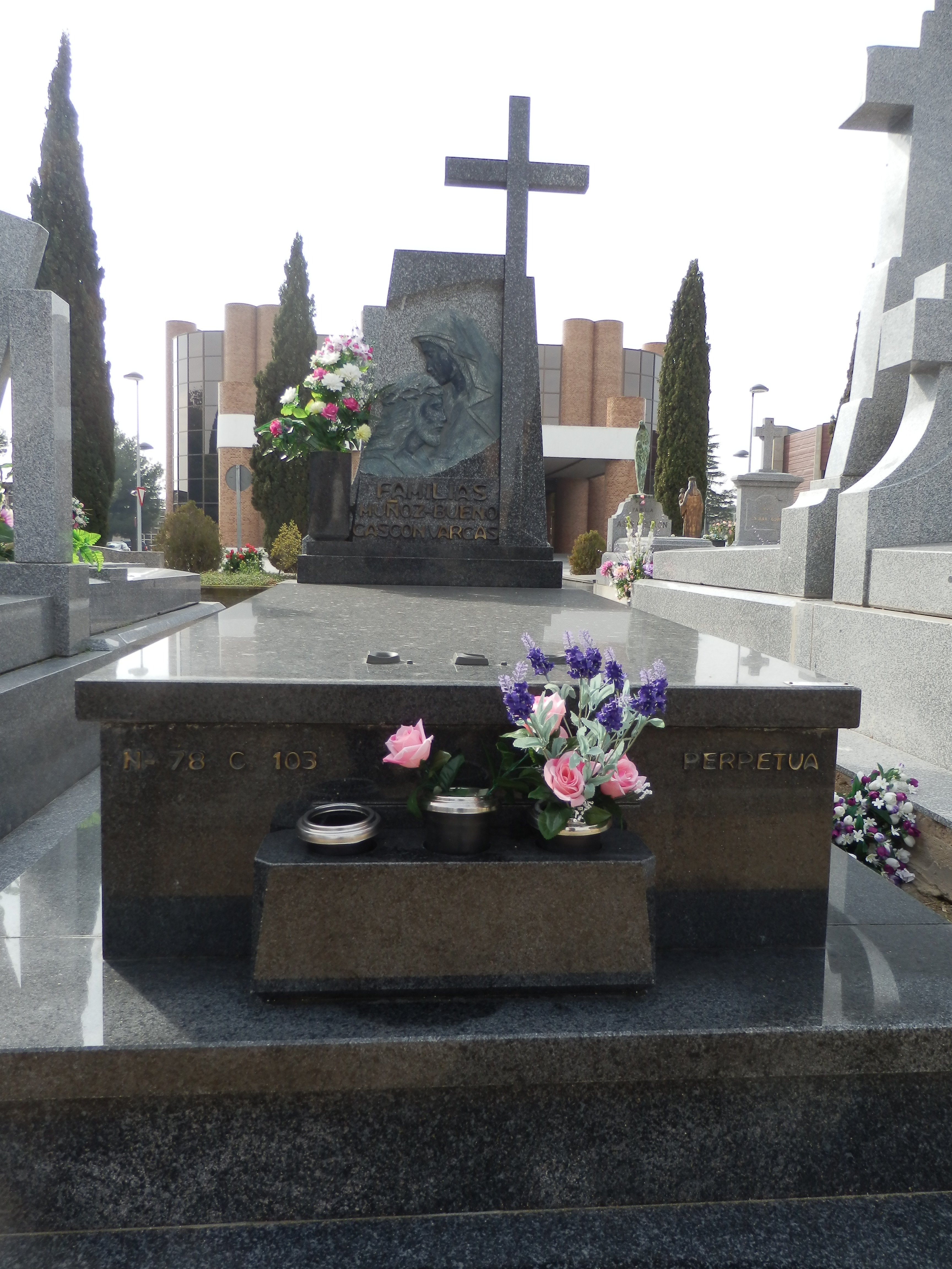 Tumba de José Poch Segura y Simona Gascón Cuartero en el cementerio de Torrero de Zaragoza. Eran los padres de Amparo Poch Gascón.